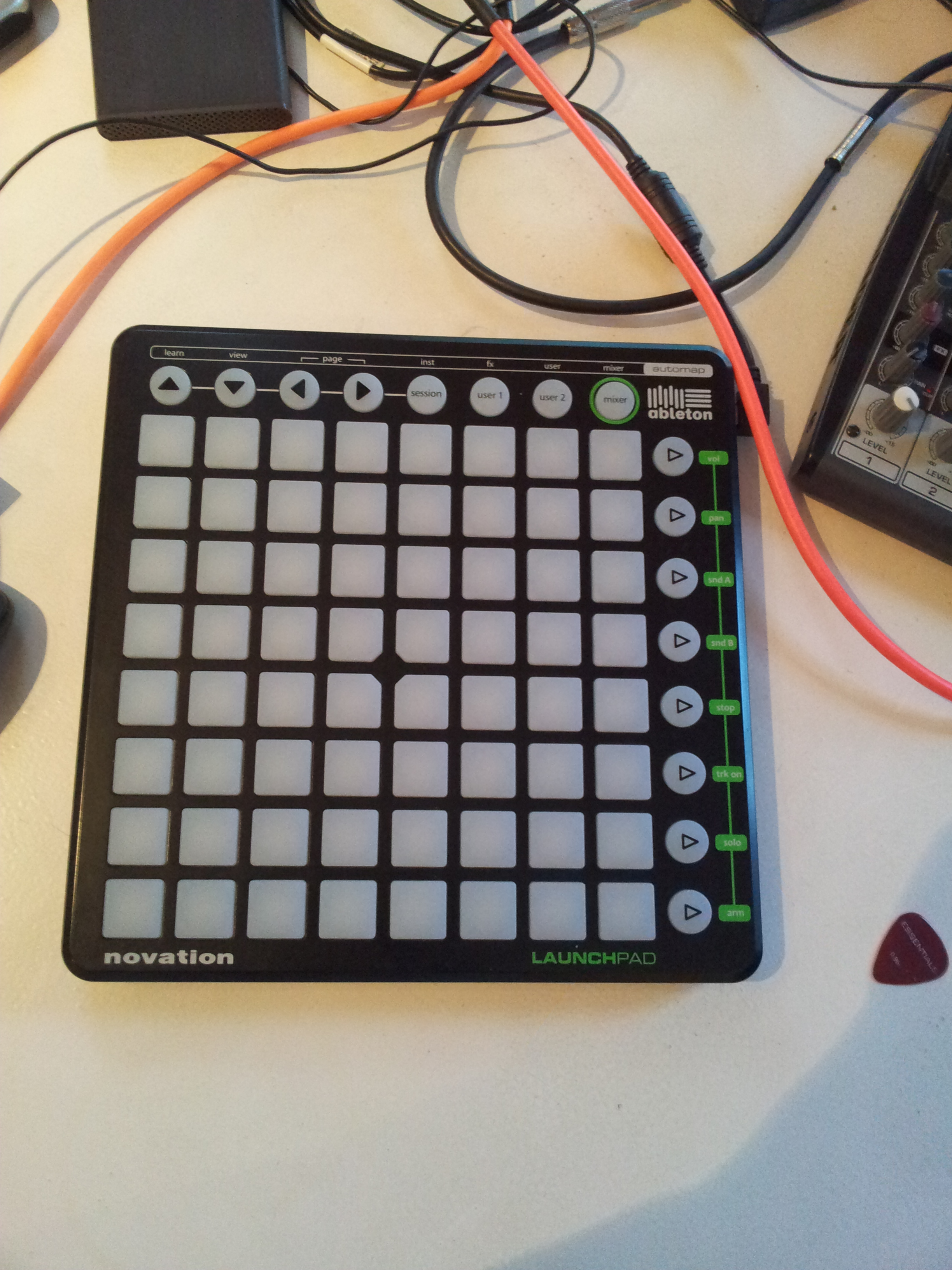 Ableton launchpad